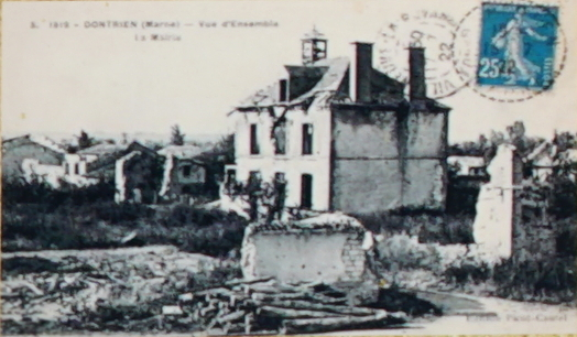 à Dontrien.